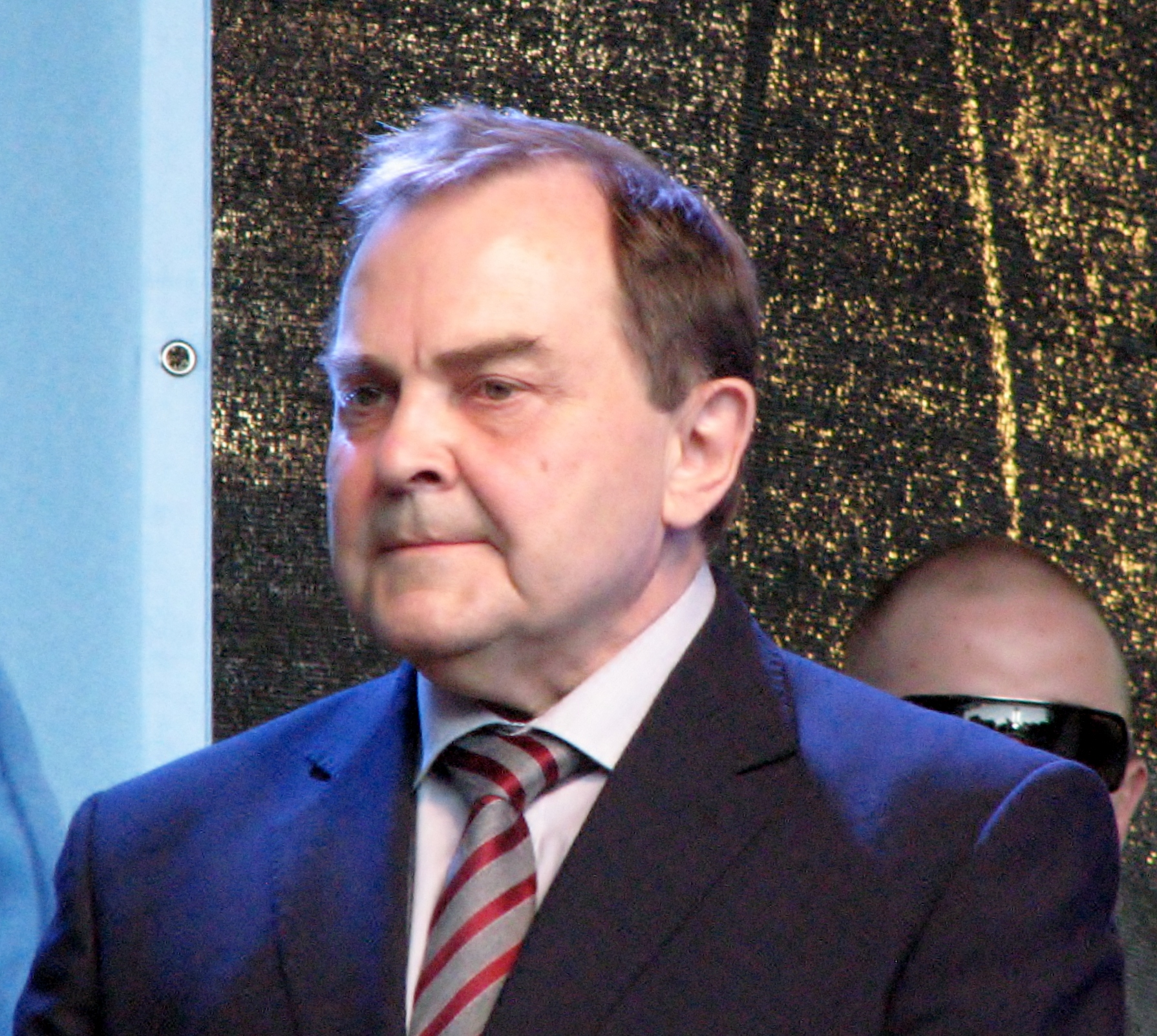 EOK juht Mart Siimann Londoni olümpiamedalistide tervituspeol